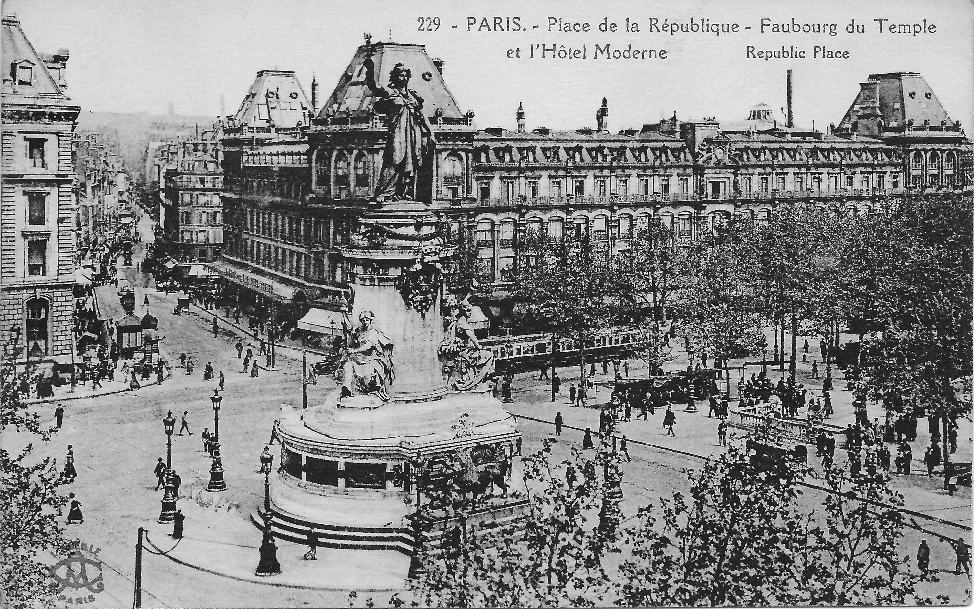 Place de la Republique begin van de XXste eeuw